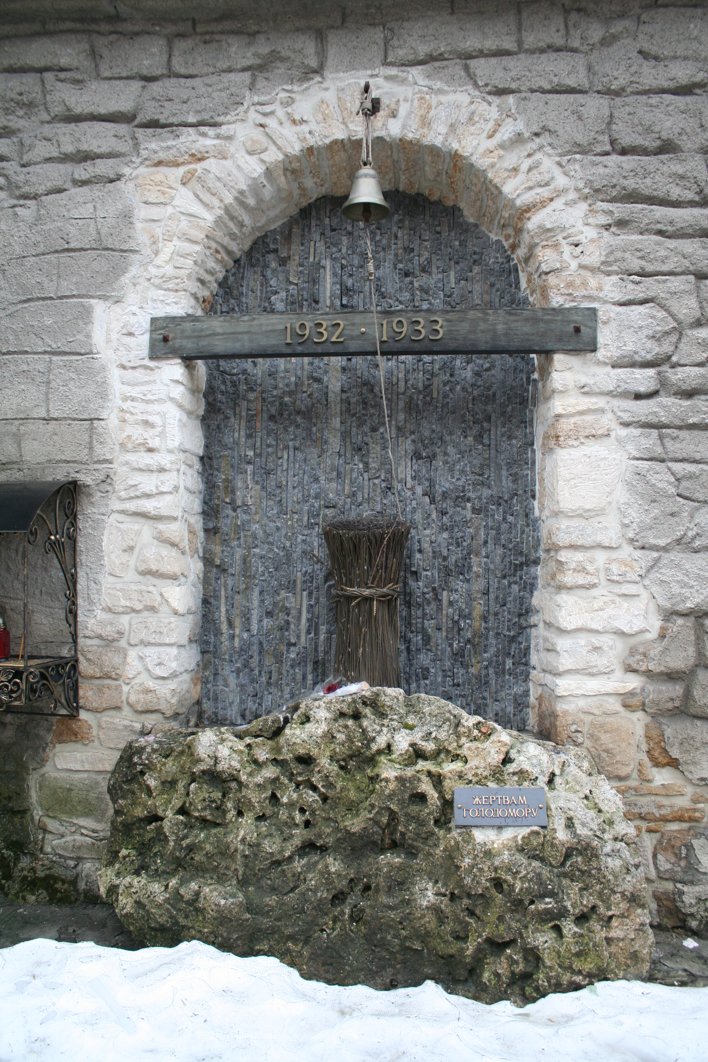 м.Тернопіль, вул. Руська, 22, Церква Різдва Христового, фрагмент, мемореал жертвам голодомору